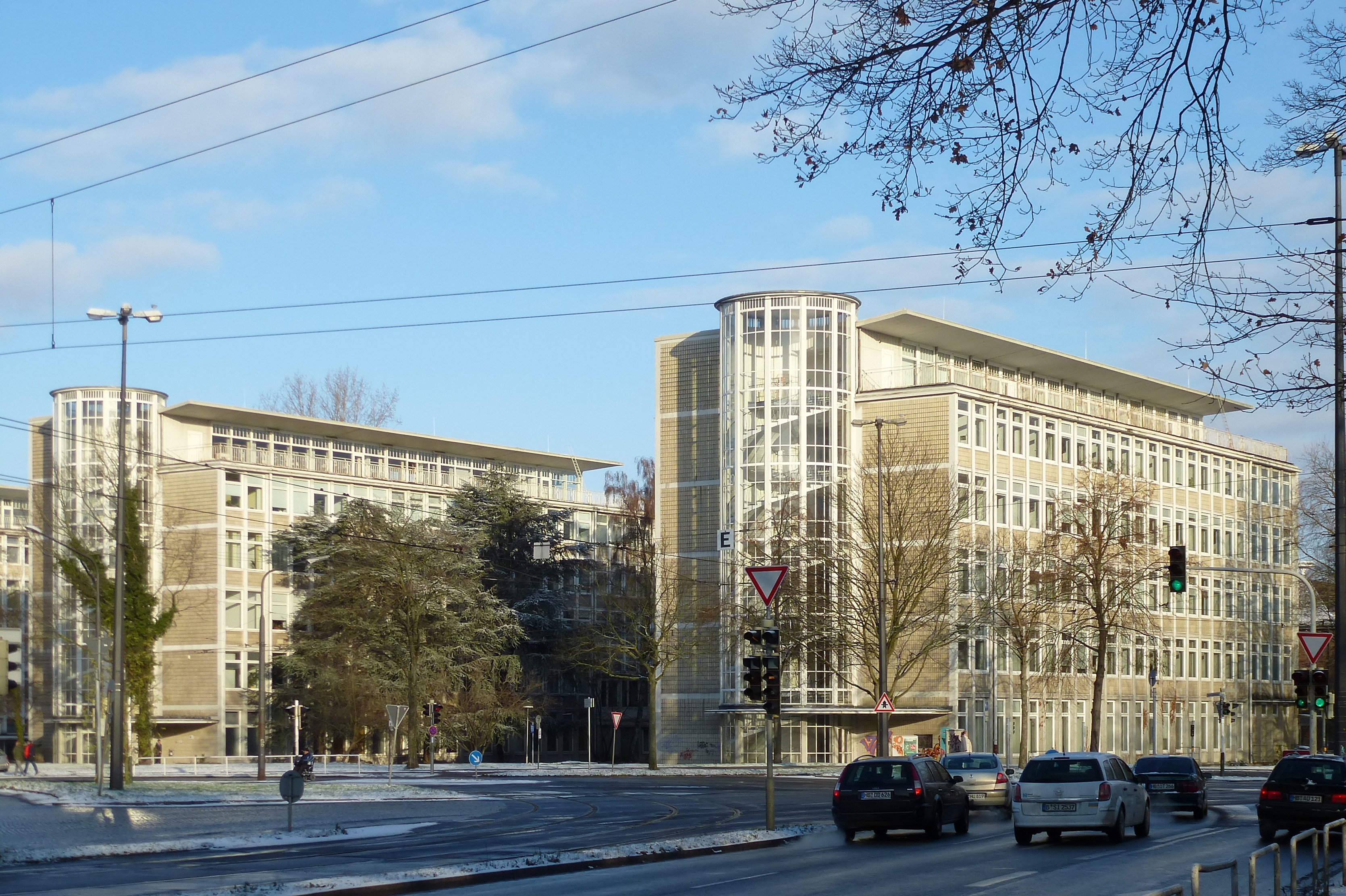 Berufsschulzentrum An der Weserbahn, Berufsbildungszentrum in Bremen, Doventorscontrescarpe 172 Das abgebildete Objekt ist ein geschütztes Kulturdenkmal in der Freien Hansestadt Bremen, mit der Nr. 0322,T beim Landesamt für Denkmalpflege registriert.